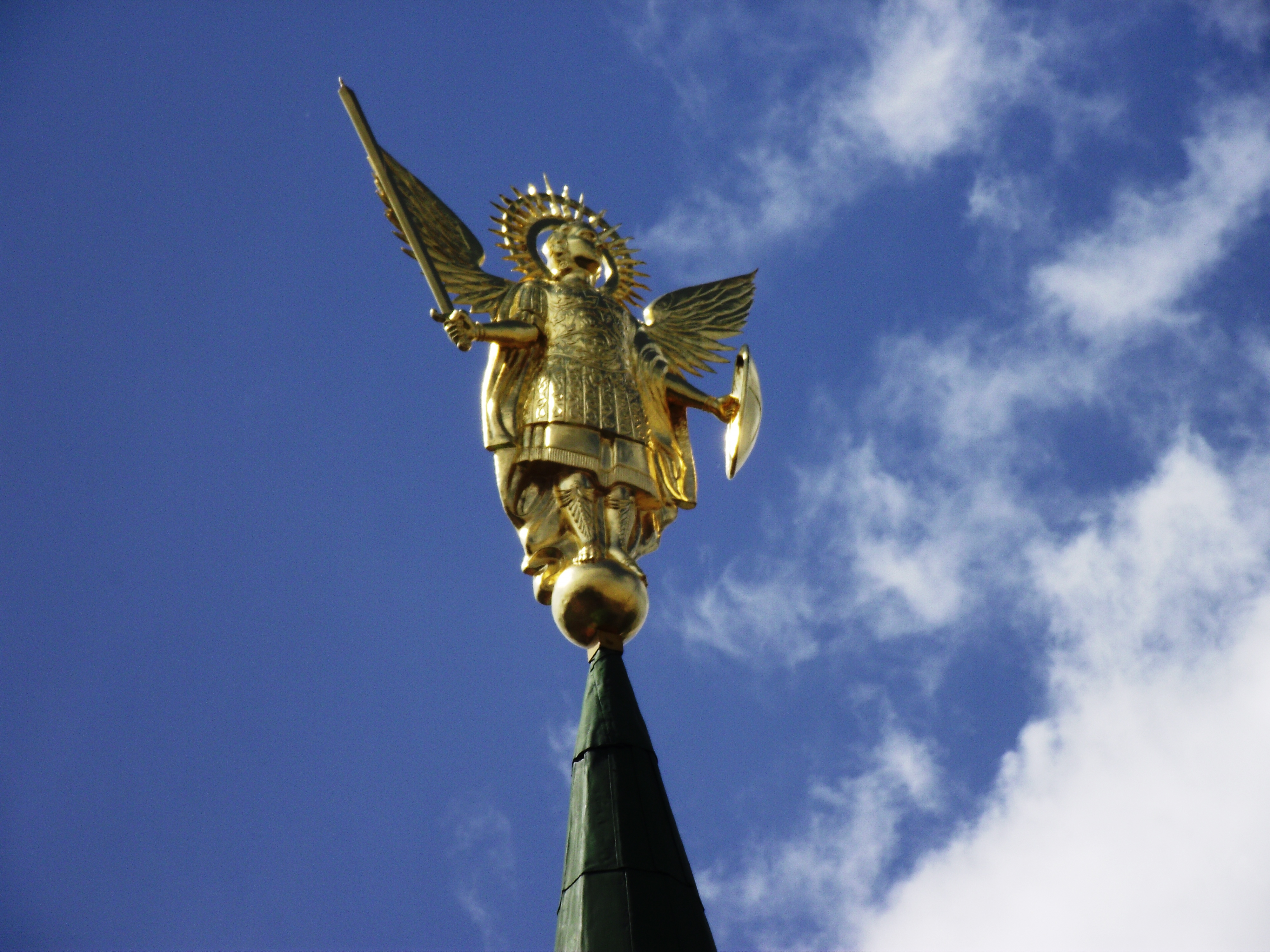 кін. ХVІІ ст. — поч. ХVІІІ ст.